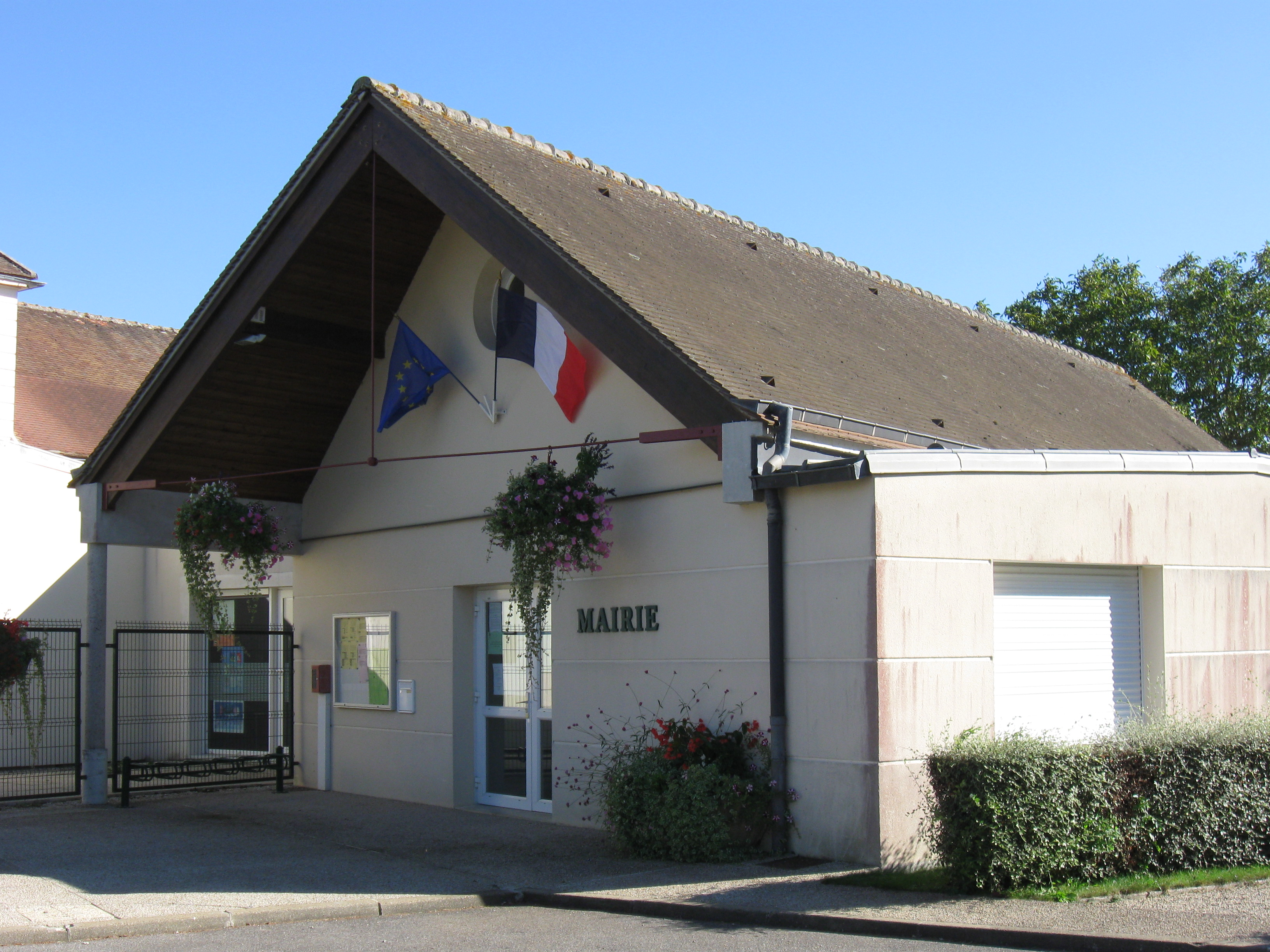 Mairie de Bougligny . (Seine-et-Marne, région Île-de-France).